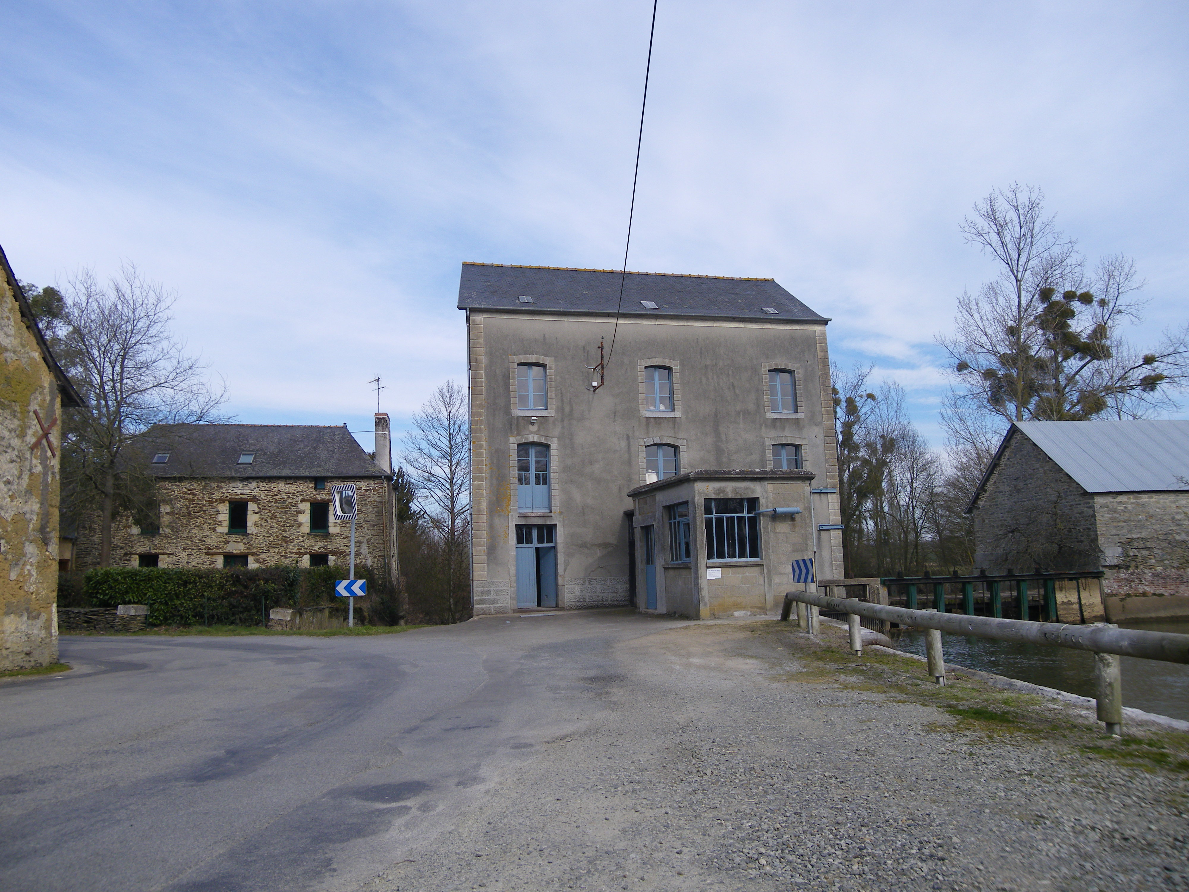 le moulin de Brécé sur la Vilaine, toujours en activité